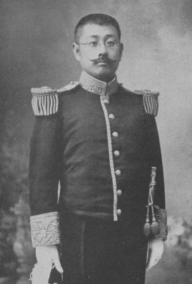 丹羽長徳子爵